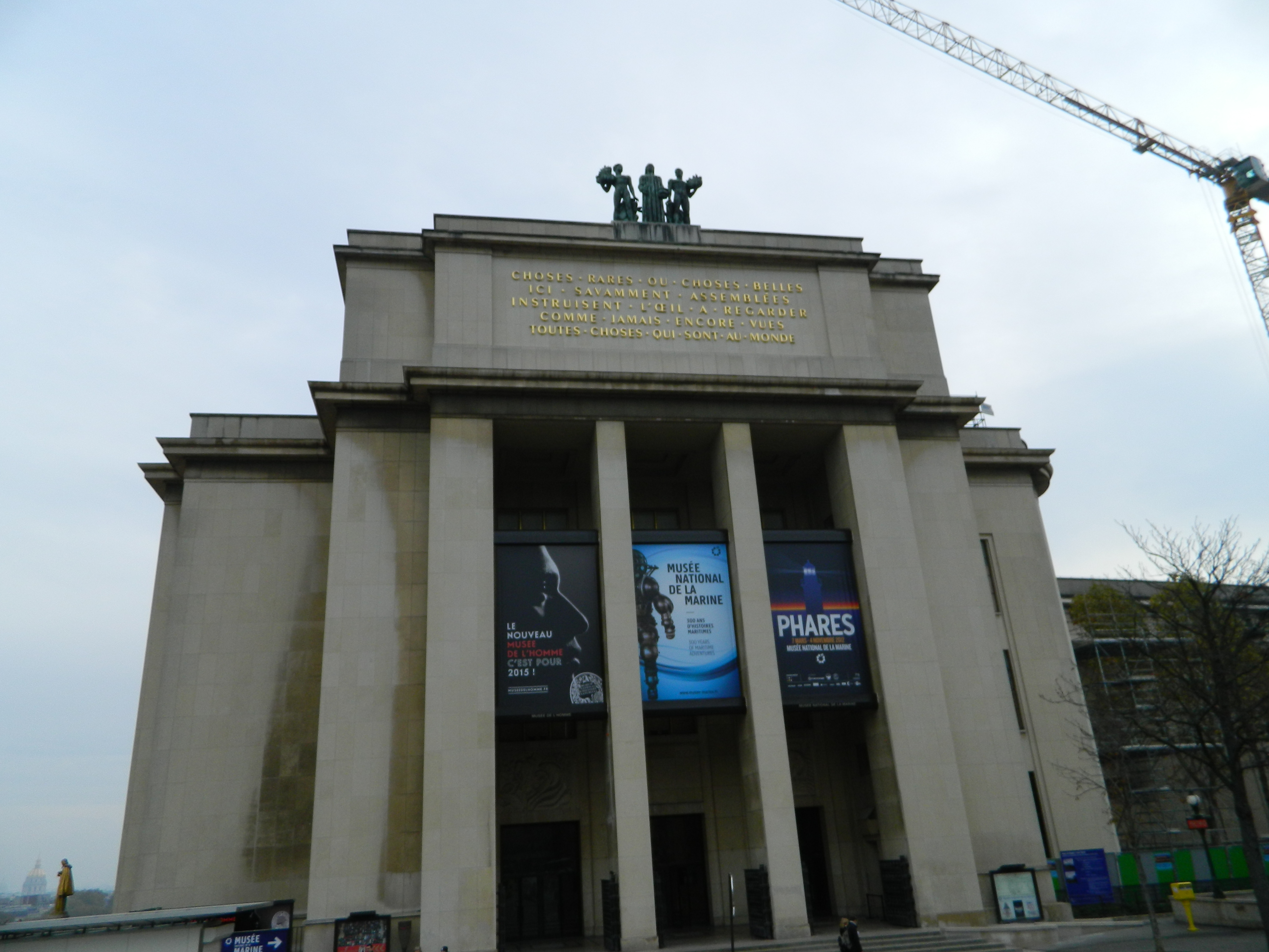 Entrée du Musée national de la Marine, Palais de Chaillot, XVIe arrondissement, Paris, France.